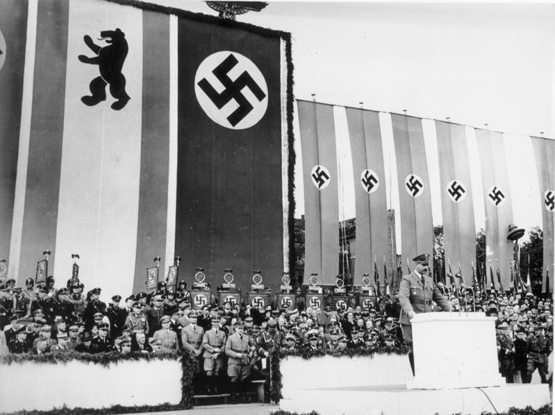 Die Grundsteinlegung zum Haus des deutschen Fremdenverkehrs am "Runden Platz" durch den Führer Der Präsident des Deutschen Fremdenverkehrs Verbandes Staatsminister Esser spricht. Fot.: Wag. 14.6.1938